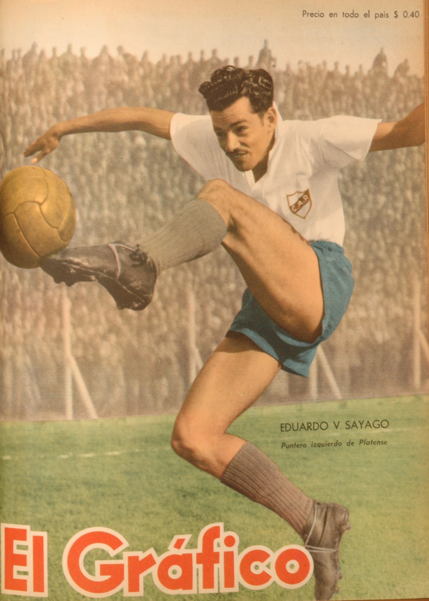 El Grafico del 09 de Julio de 1948. Edicion 1513